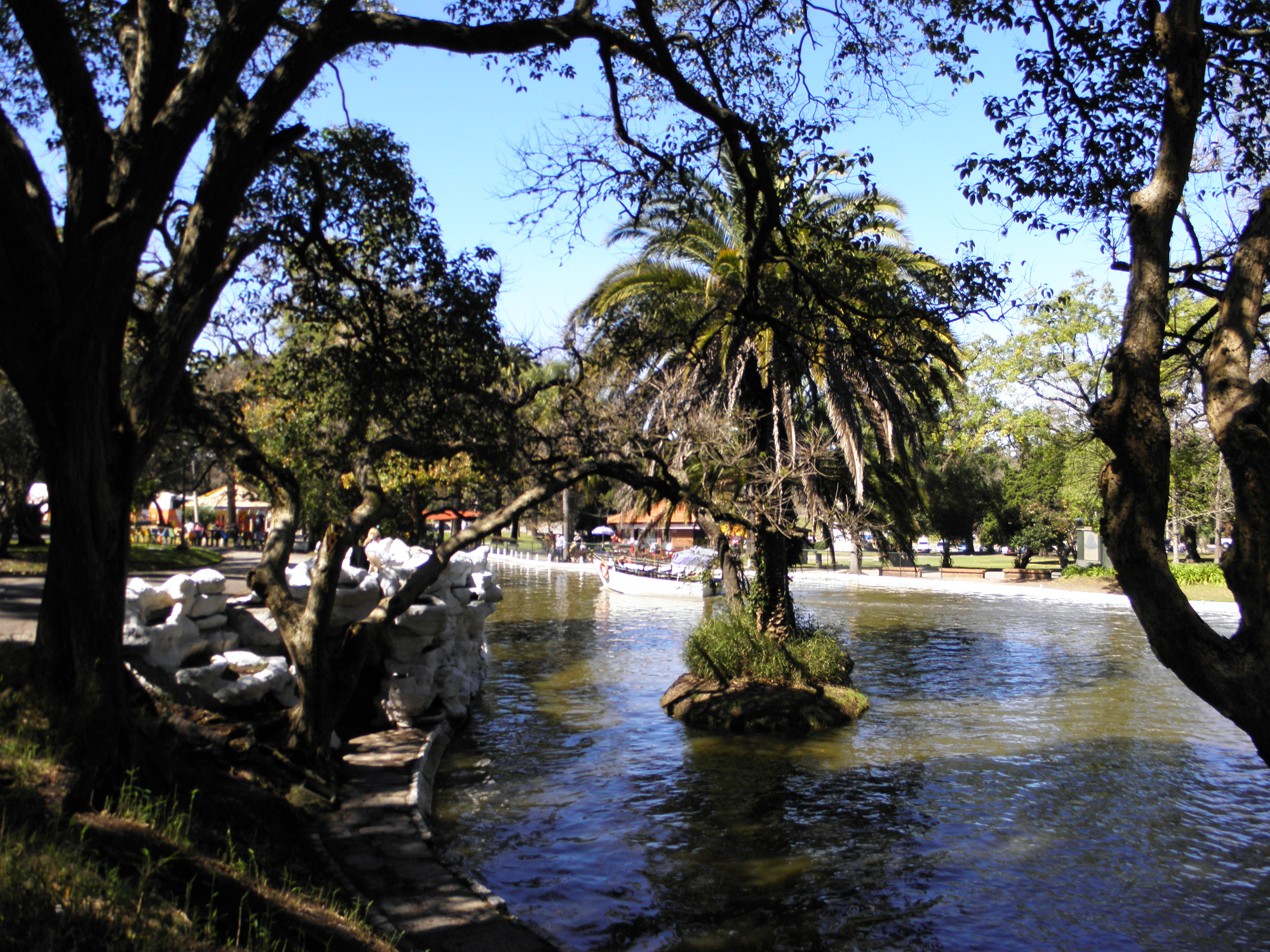 Parque El Prado. Ubicada en el departamento de Montevideo